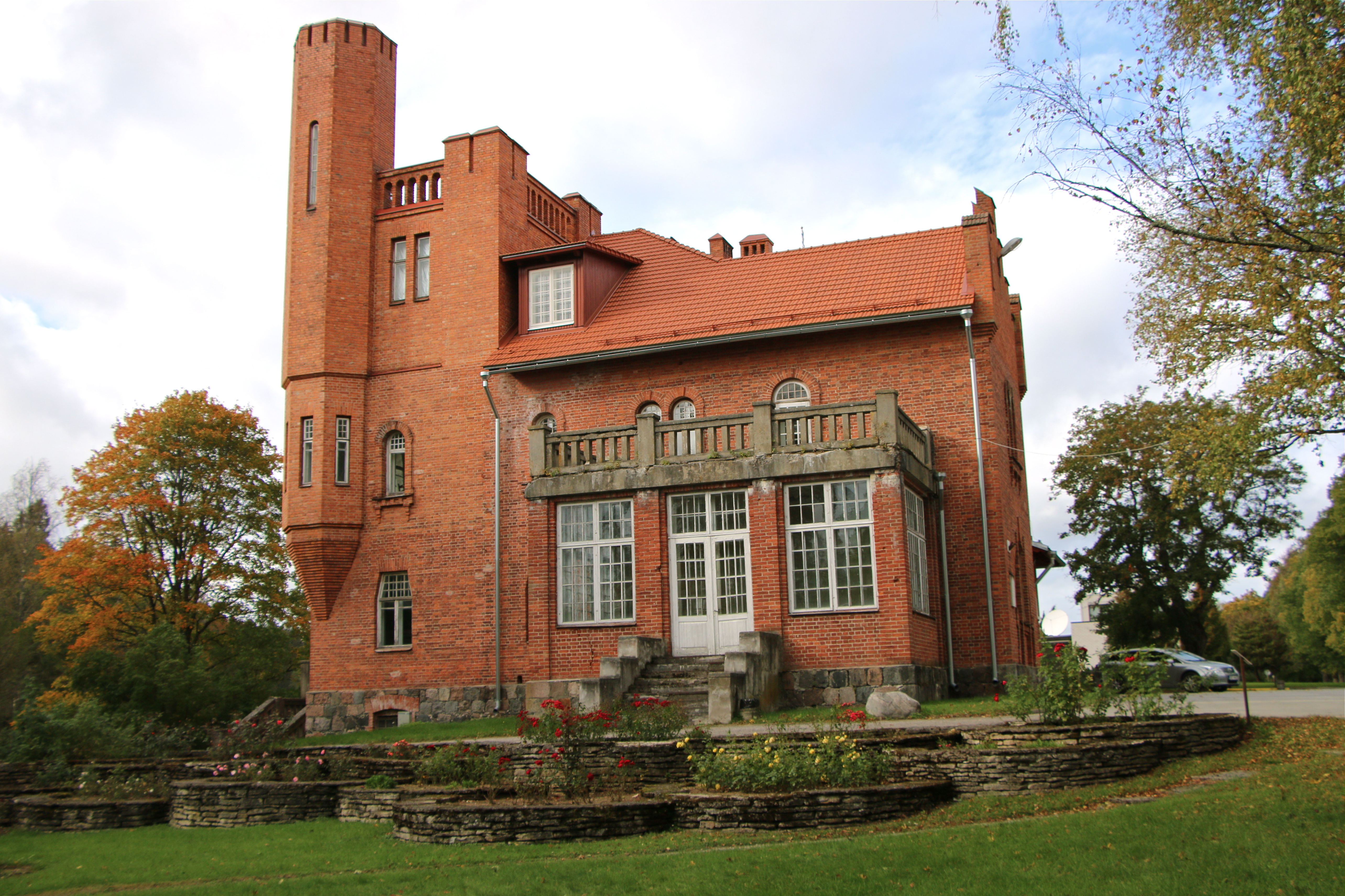 Kultuurimälestis 15039